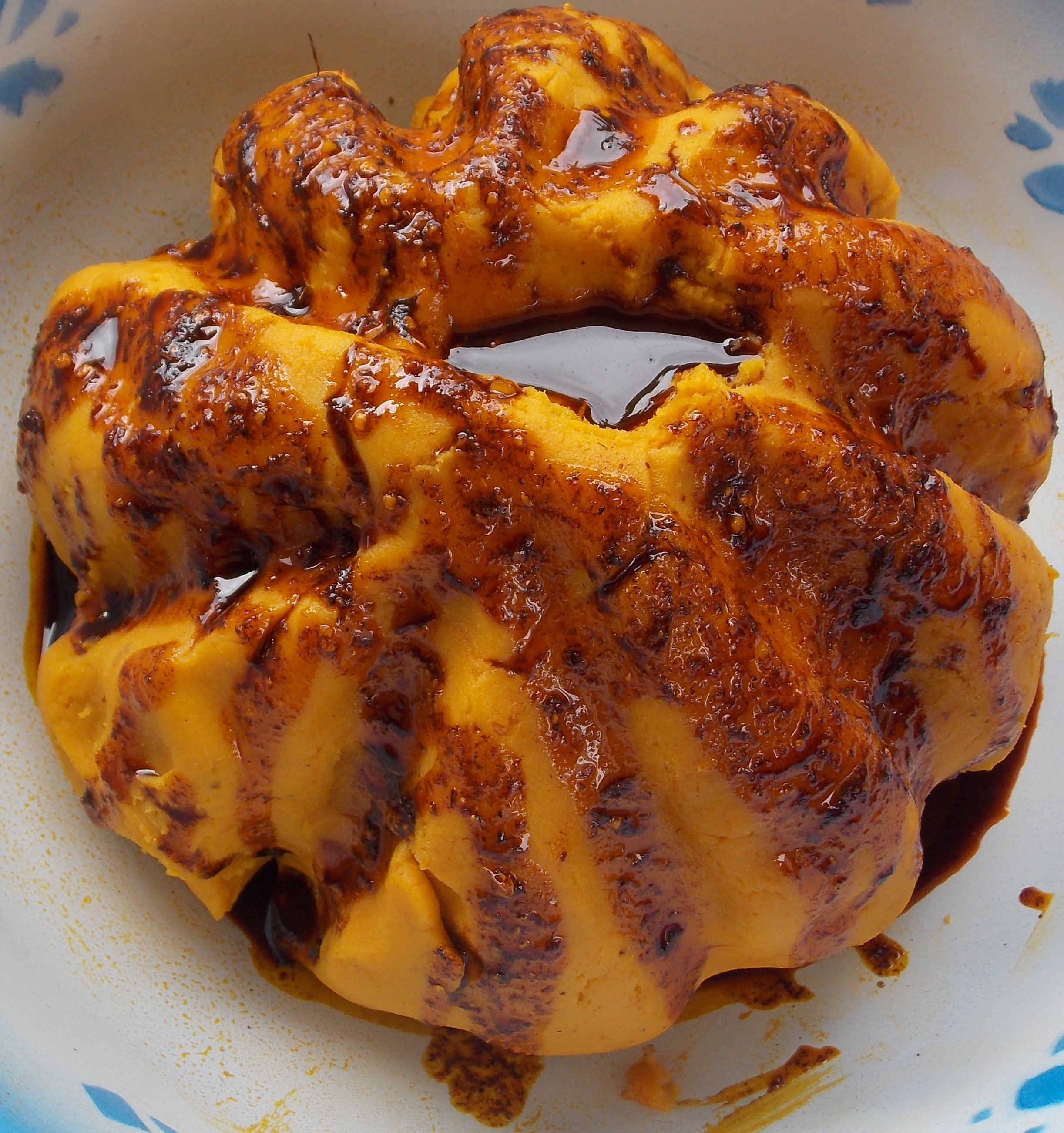 Présentation d'un plat de foufou banane. This is an image of food from Ivory Coast